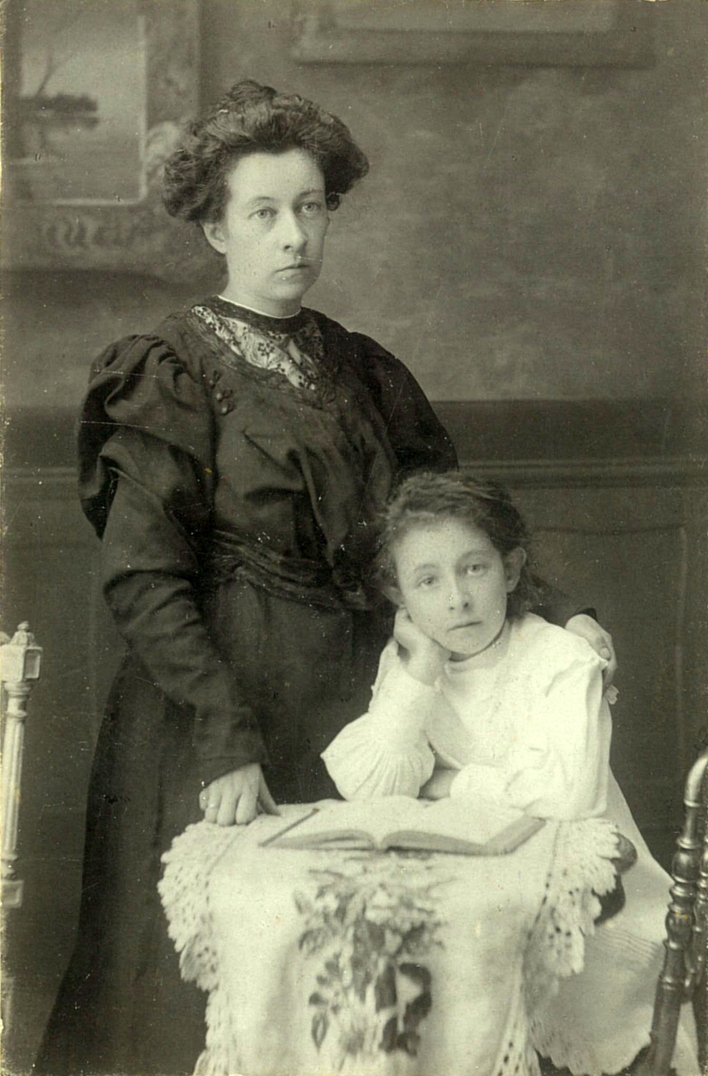 Лили Пух (ур. Кербкр) с дочерью Гертрудой